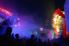 Voov-experience.